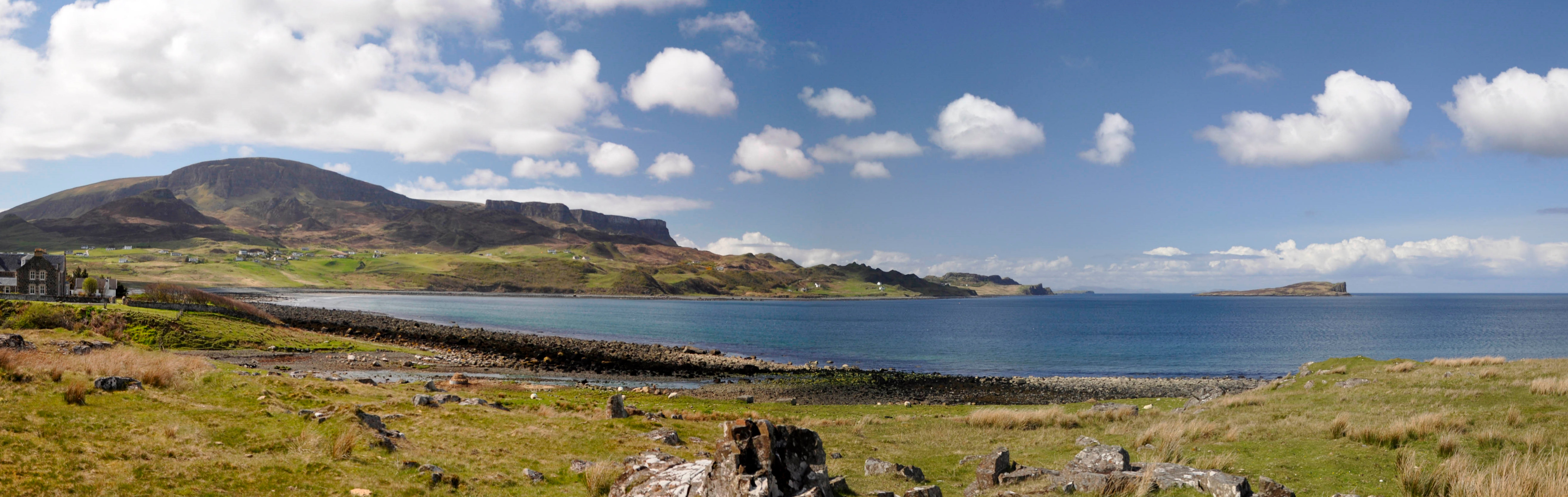 Staffin - op het eiland Skye, Schotland